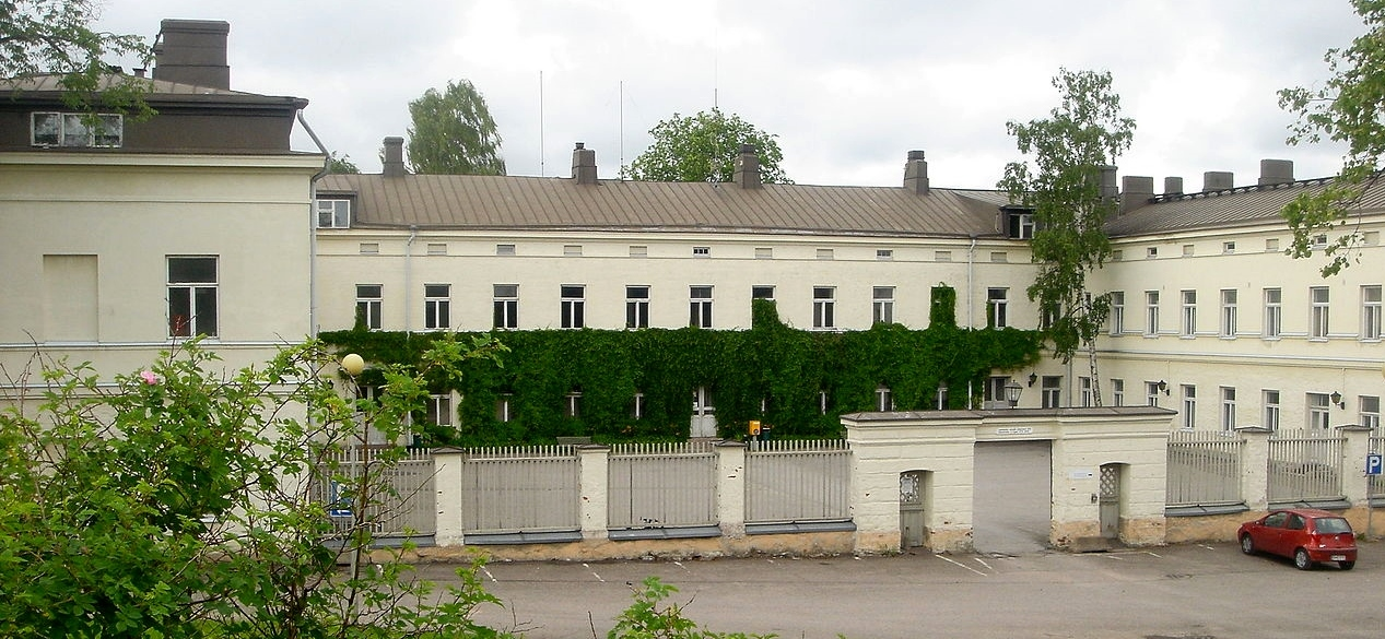 Lapinlahden sairaala Helsingin Lapinlahdella